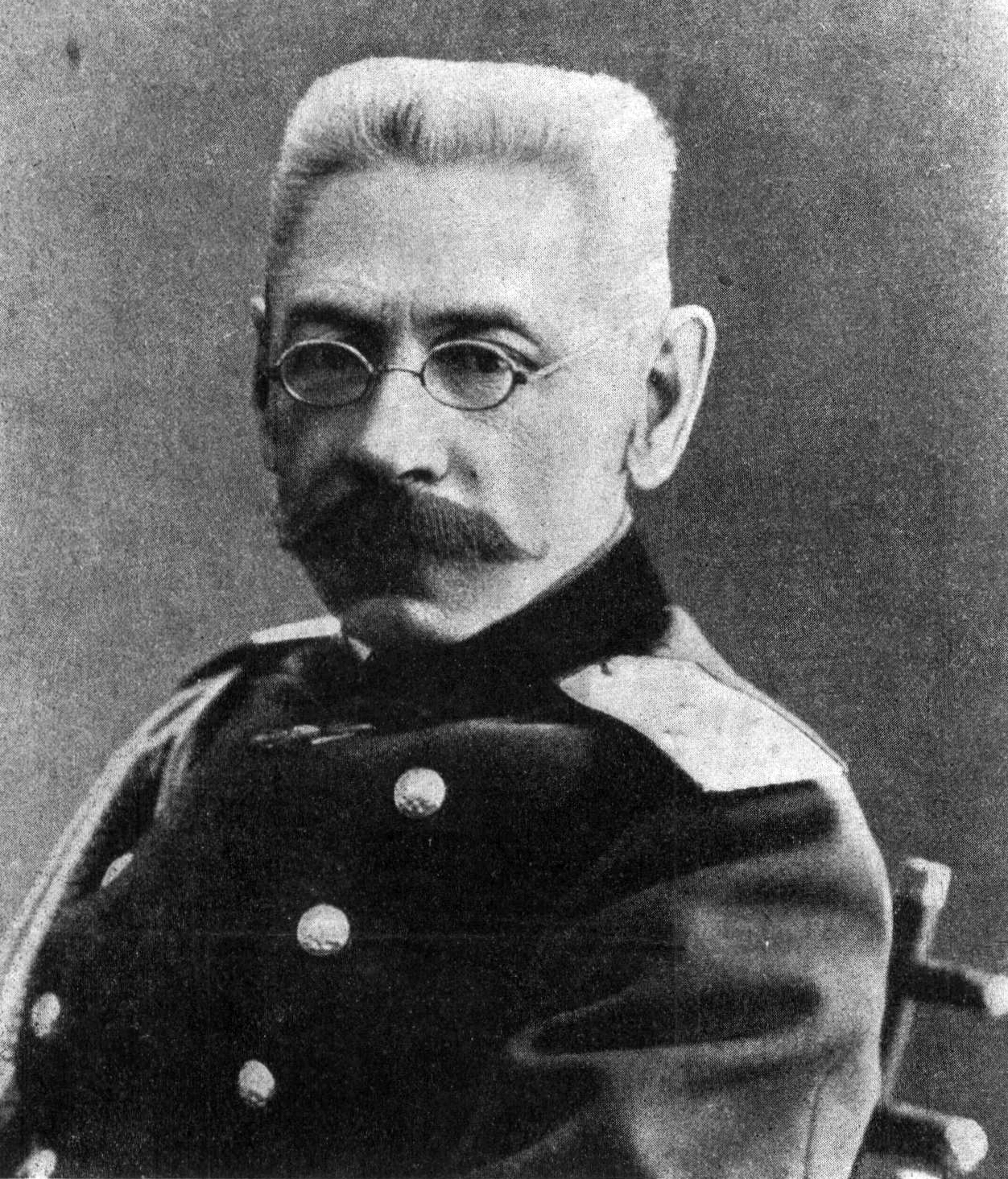 Рузский, Николай Владимирович